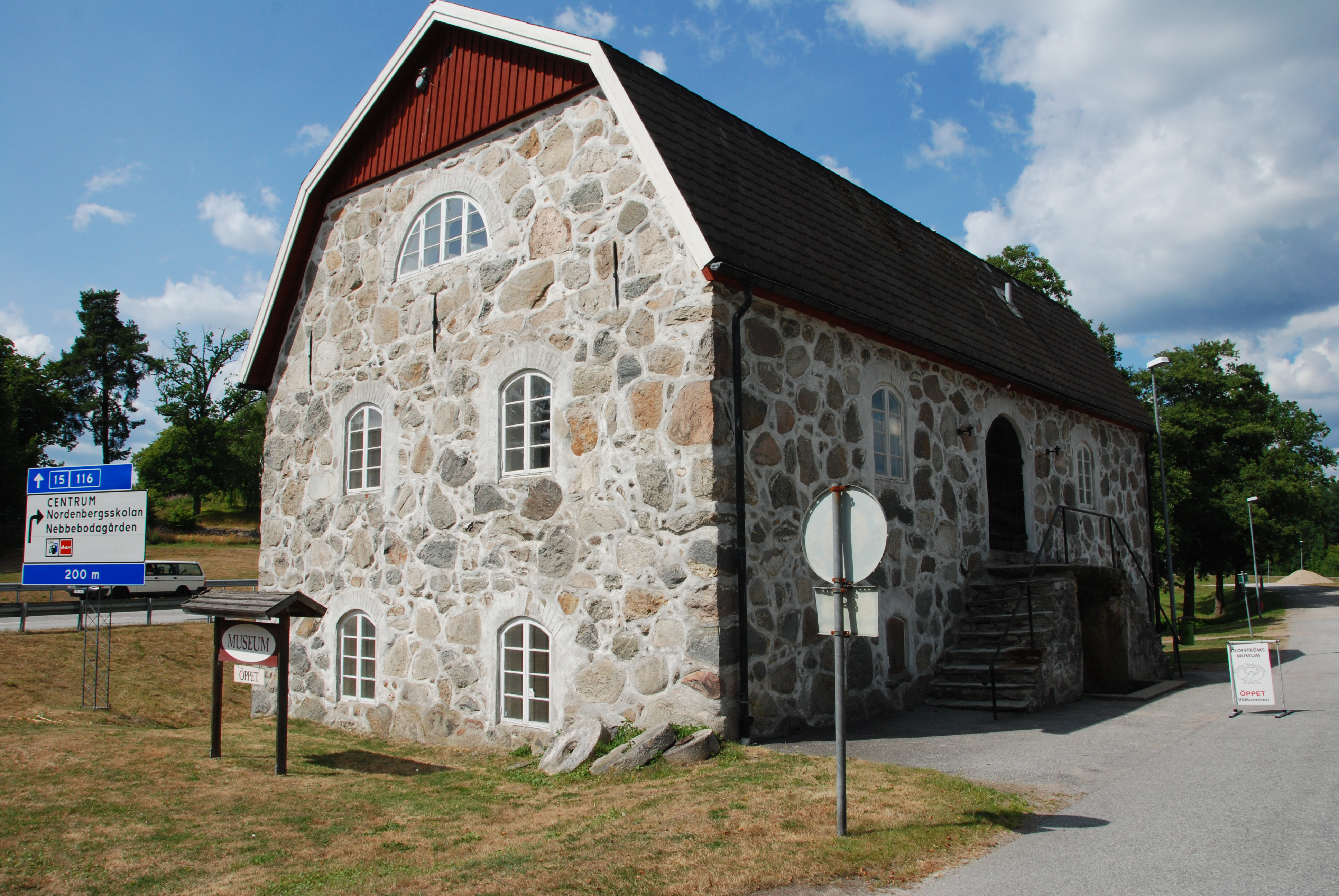 Olofströms museum. Olofström, Olofström